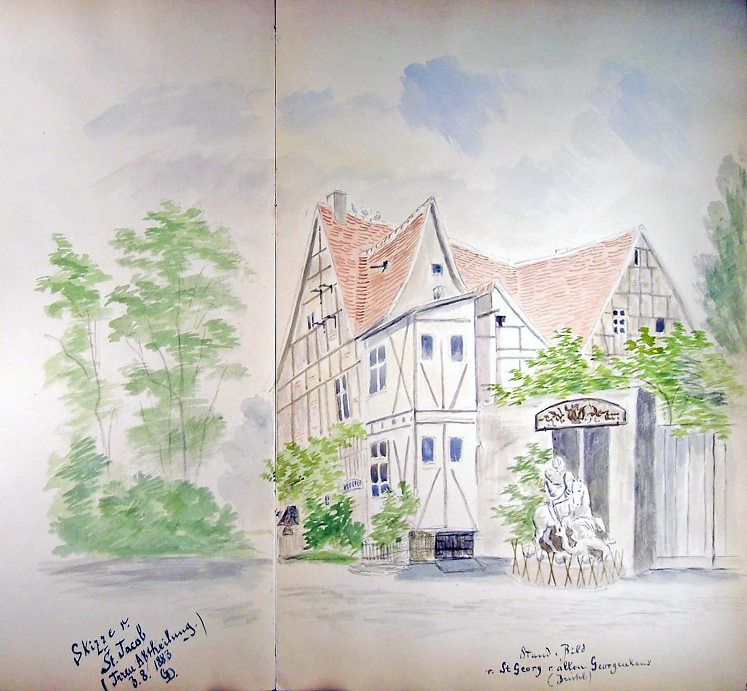 Standbild des St. Georg (vom alten Georgenhaus) im alten Jacobshospital Leipzig